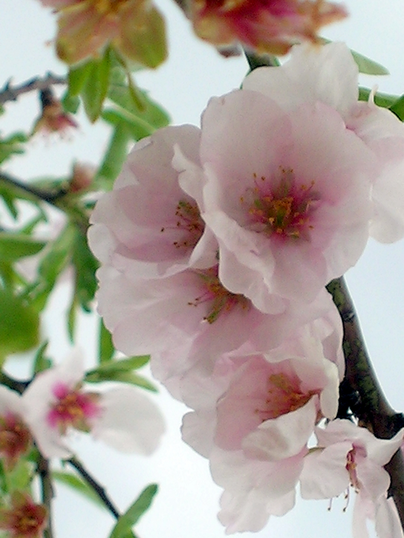 Prunus dulcis Flors d'ametler. - Benissa